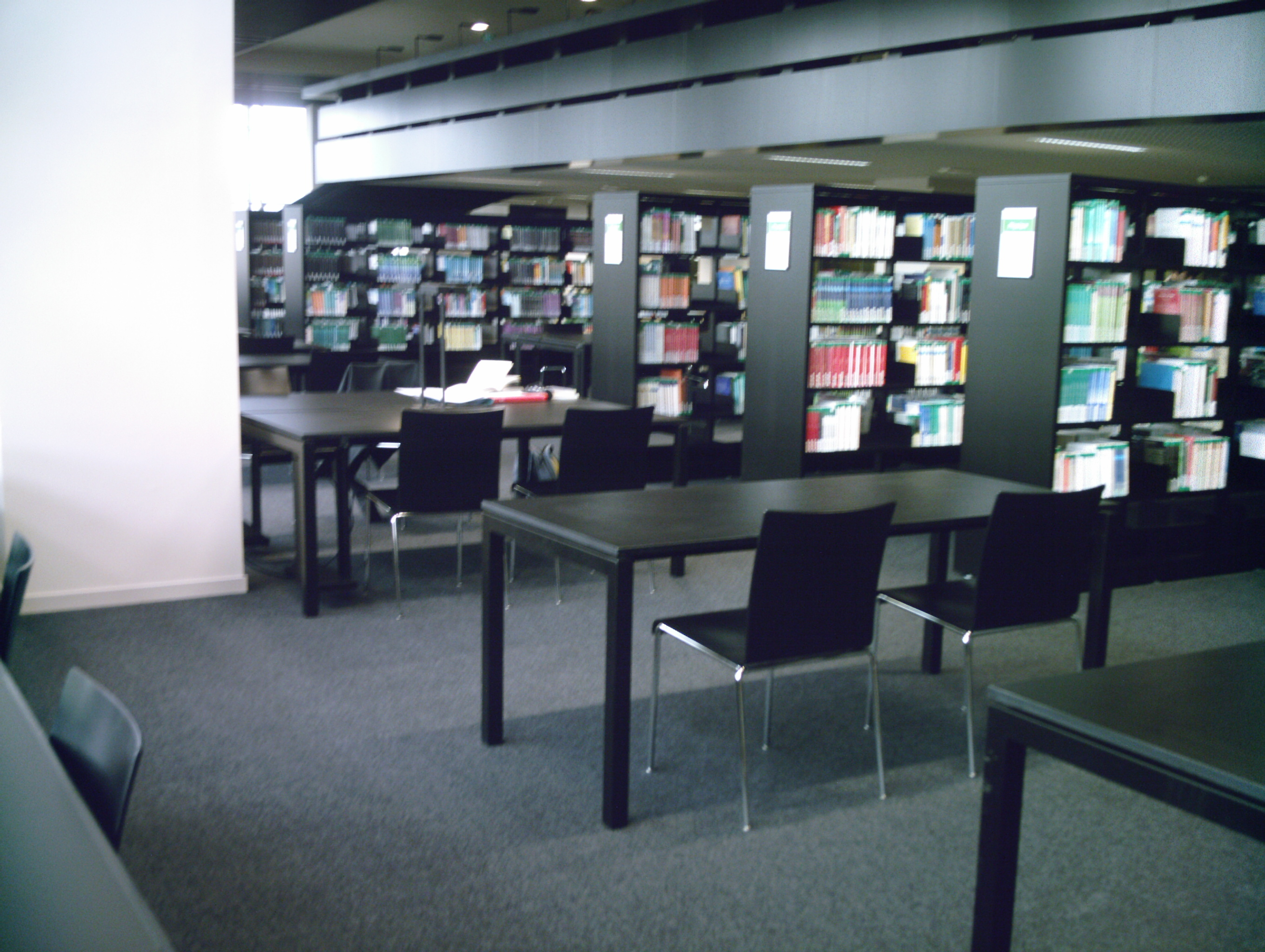 Niveau 4 de la bibliothèque universitaire de la Doua. Rayonnage consacré aux livres de science physique.